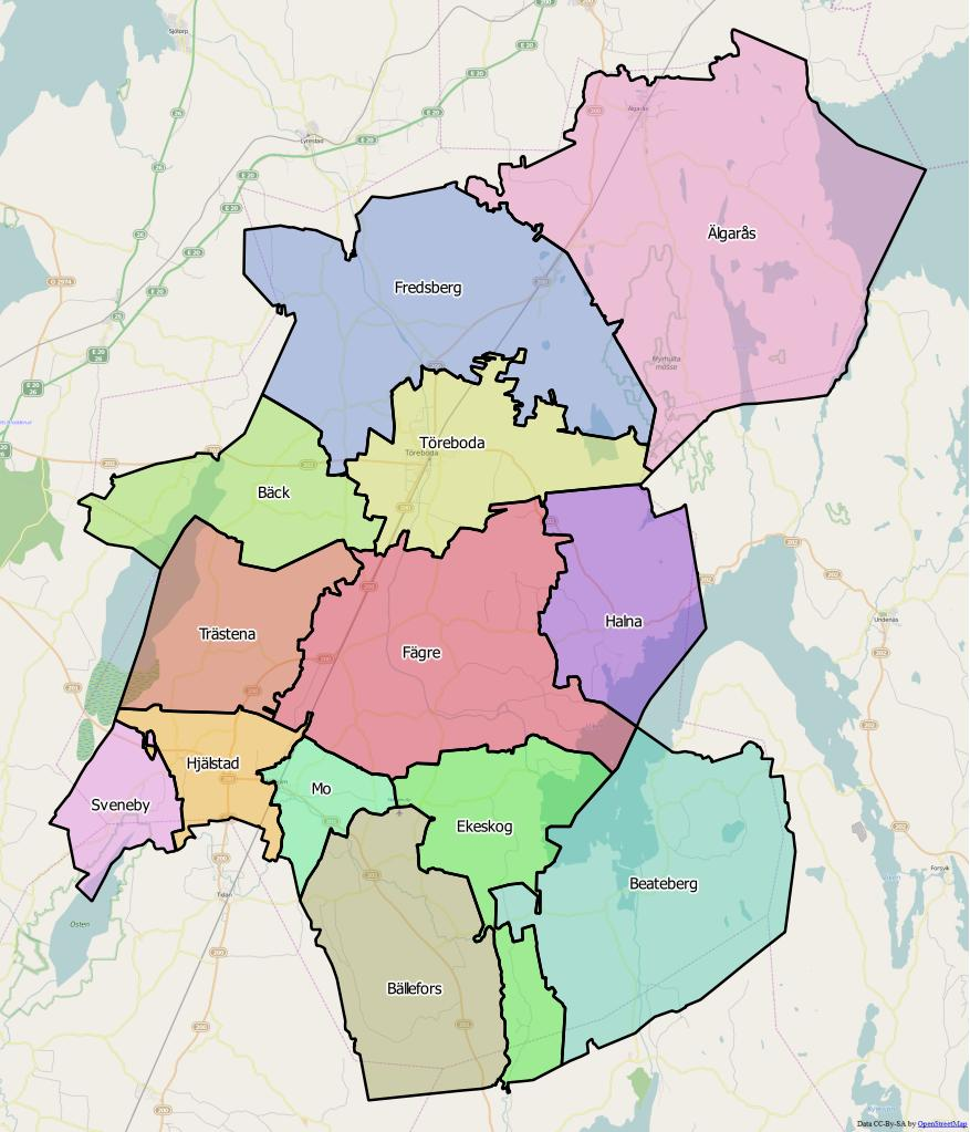 Distriktsindelningen i Tranås kommun World file: 72.74035853837759191 0 0 -72.74035853837759191 1544539.78860939620062709 8147280.11811201367527246